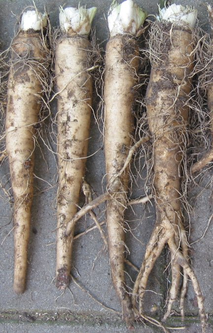 Witlofwortels.